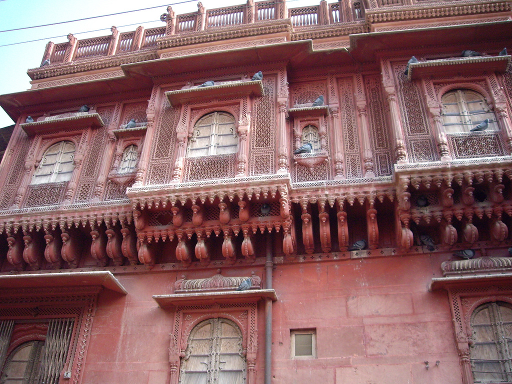 India (2007)